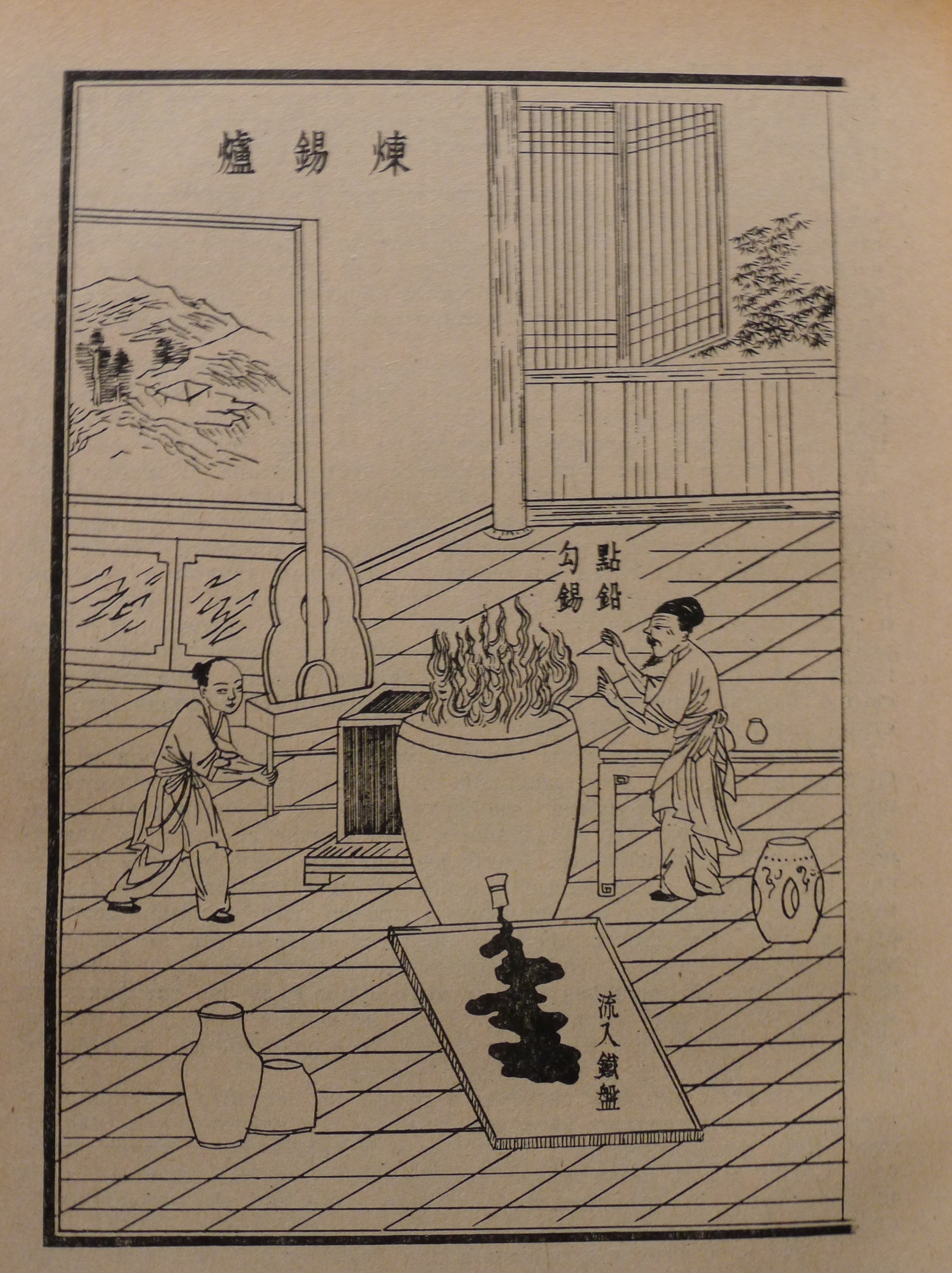 Виплавка олова, середньовічному трактату